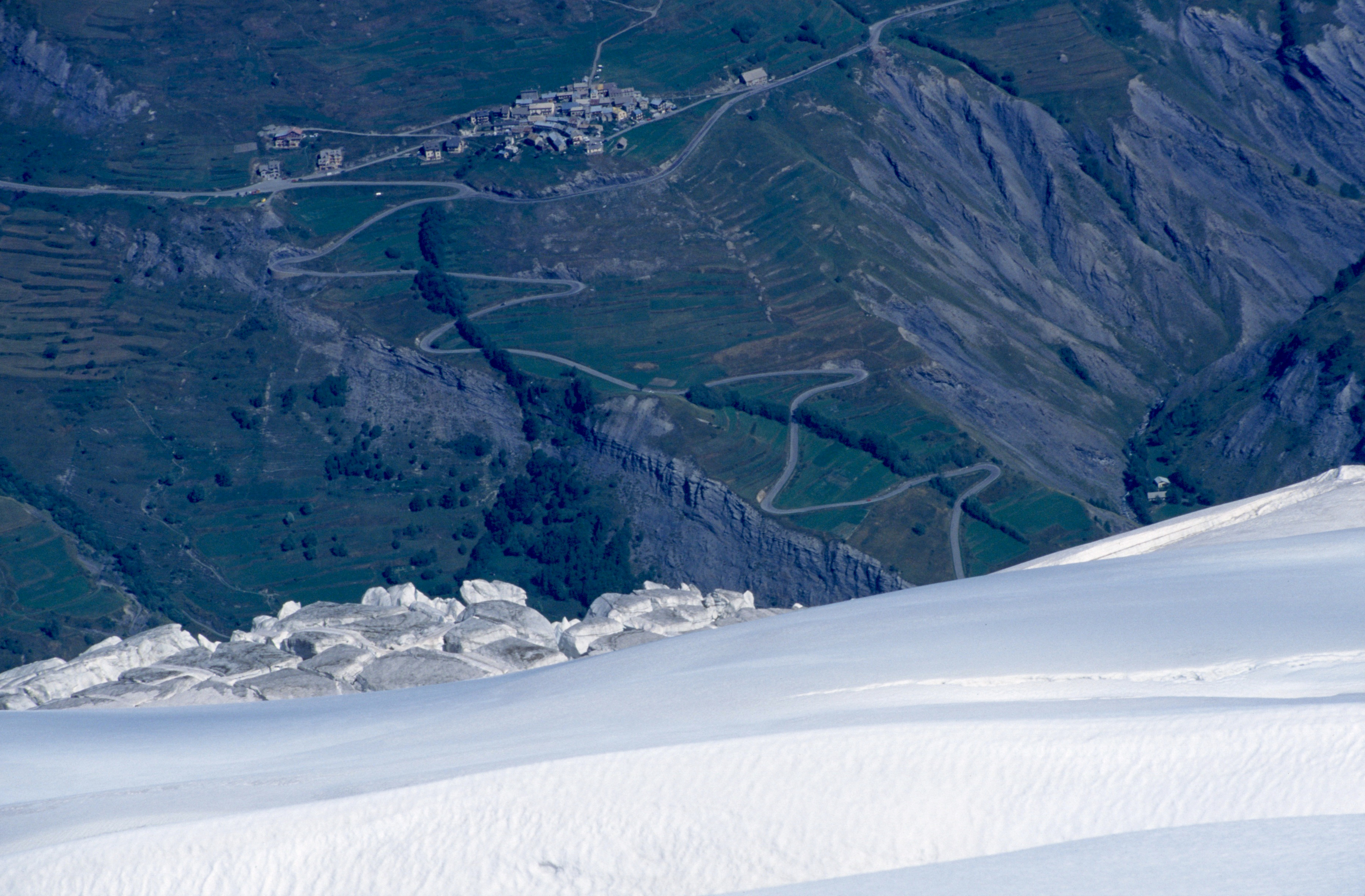 Hameau de Ventelon à la Grave vu du pic central de la Meije. Diapo scannée.